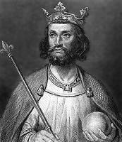 Eudes Ier de France, Odo of France